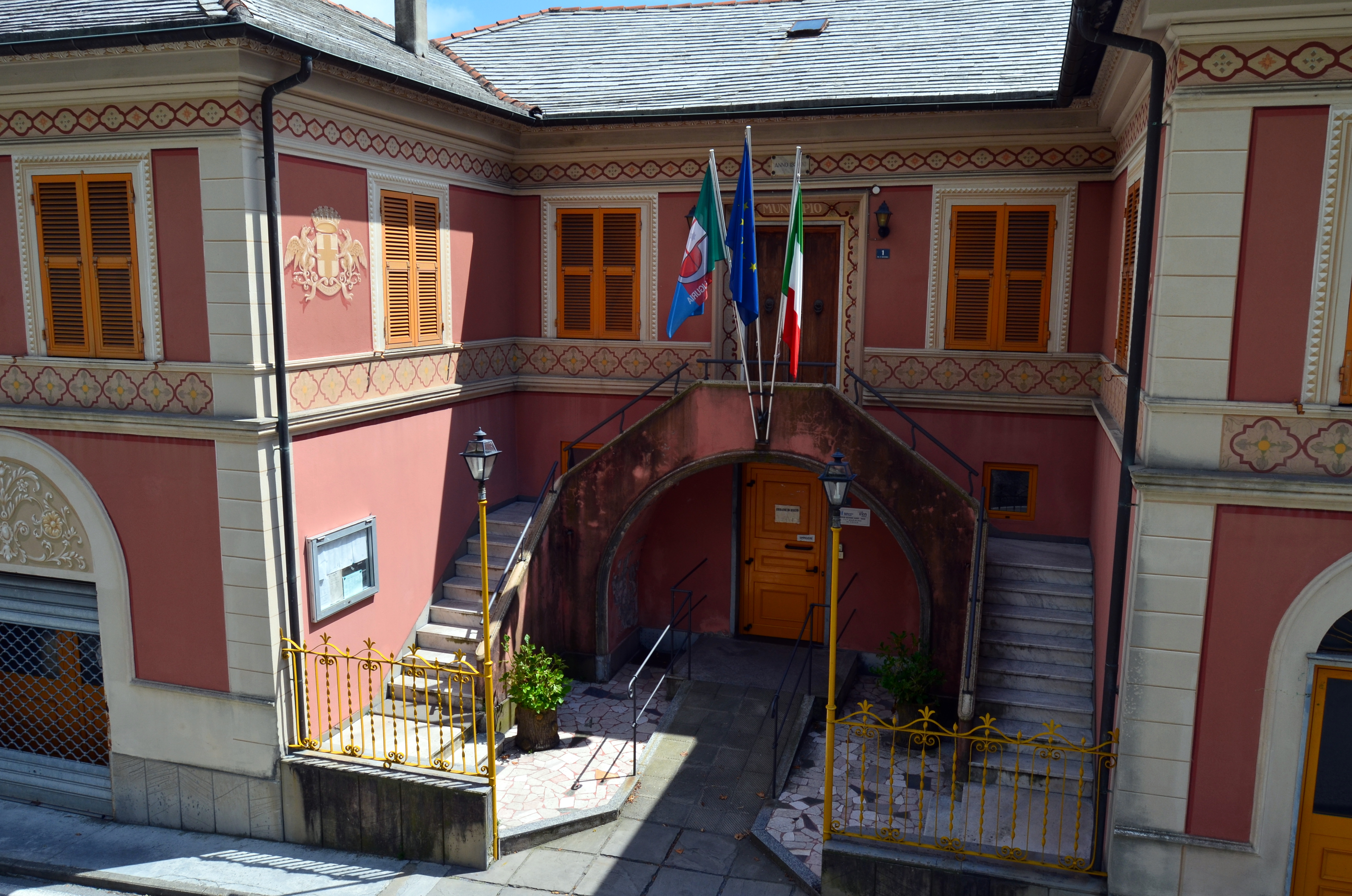 Municipio di Uscio, Liguria, Italia